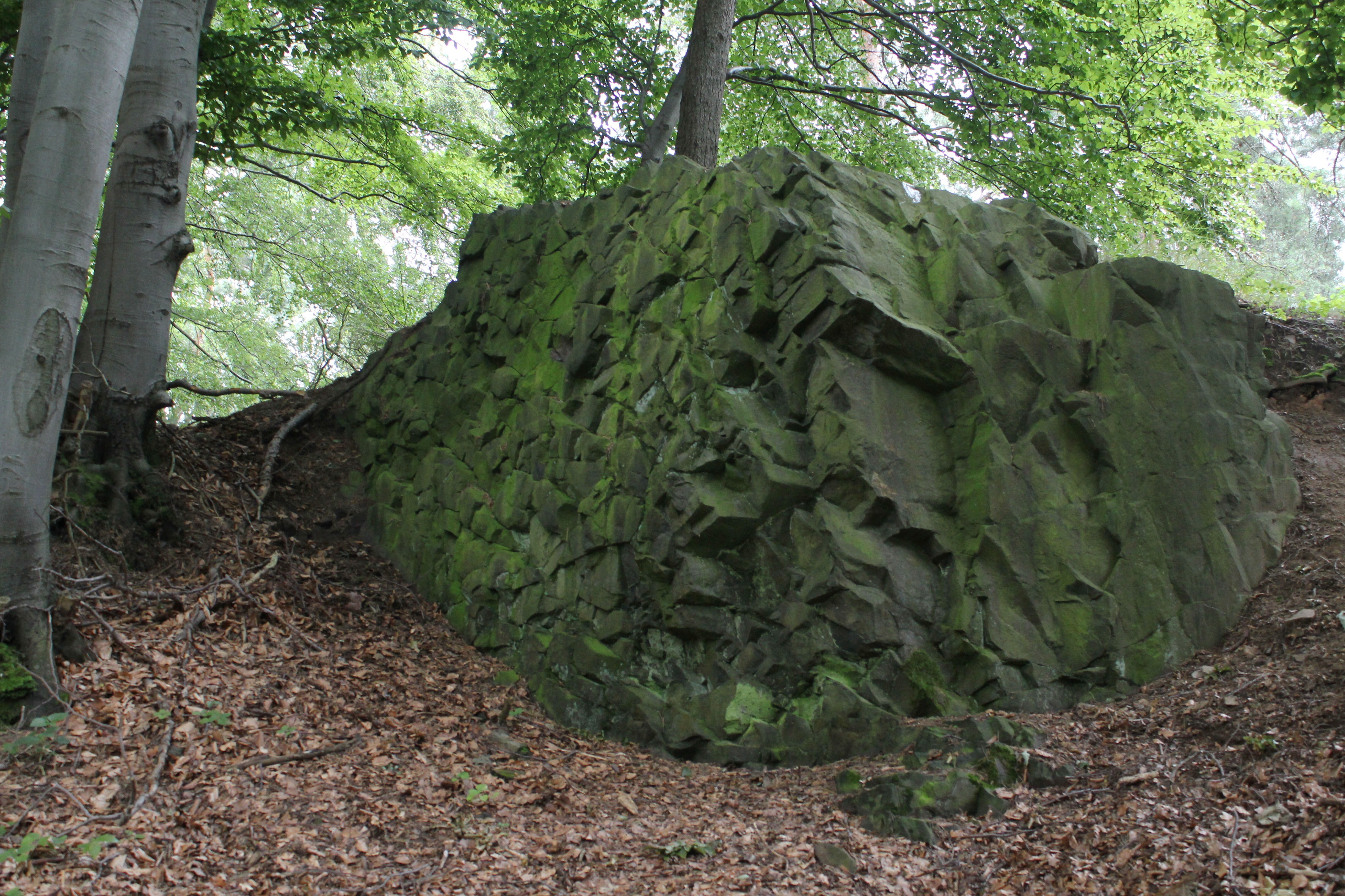 Čertova zeď